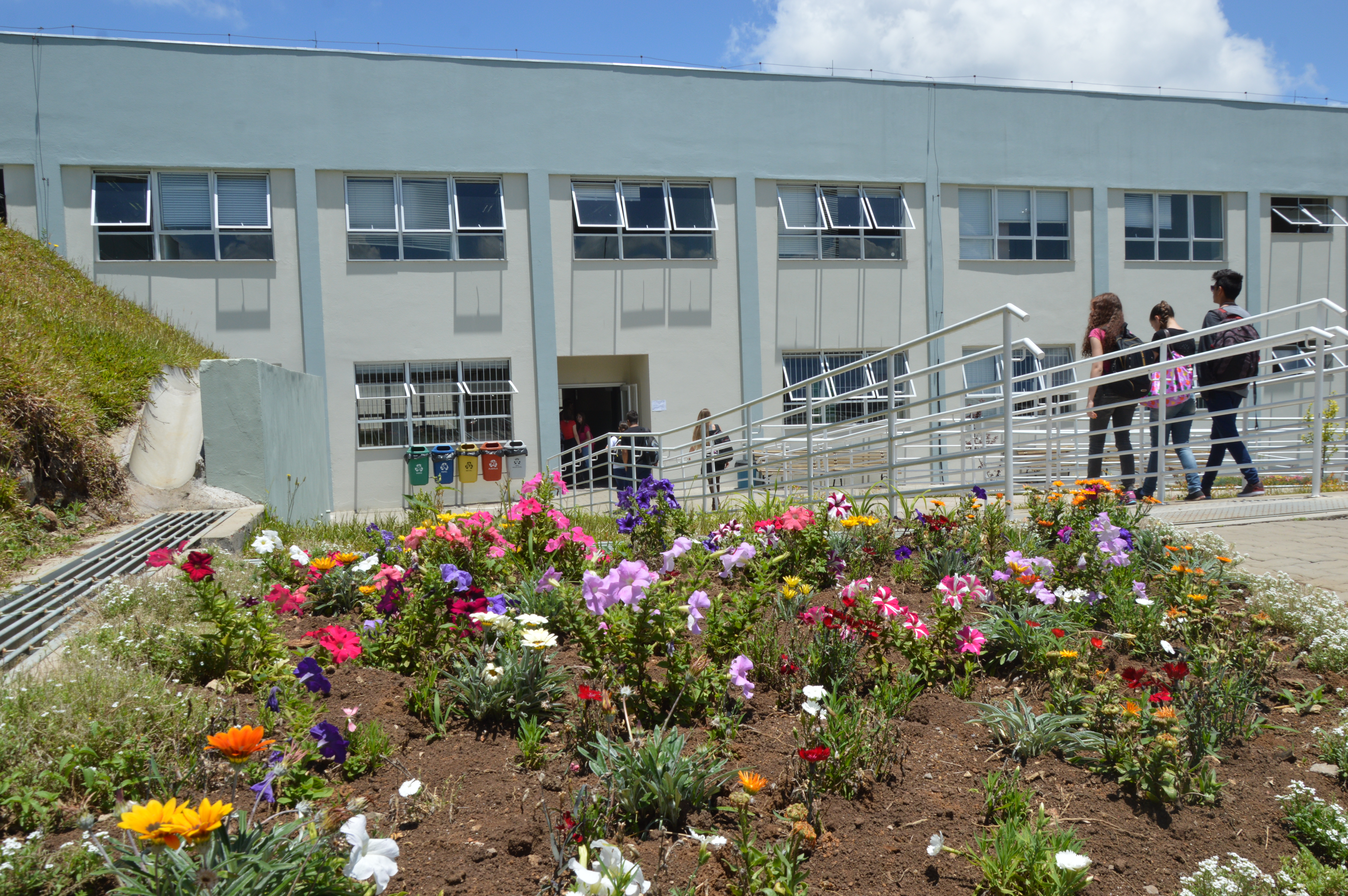 Fachada do bloco A4 do Instituto Federal de Educação, Ciência e Tecnologia do Rio Grande do Sul - Campus Caxias do Sul